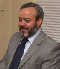 Bruno Baranda, entonces subsecretario del Trabajo.